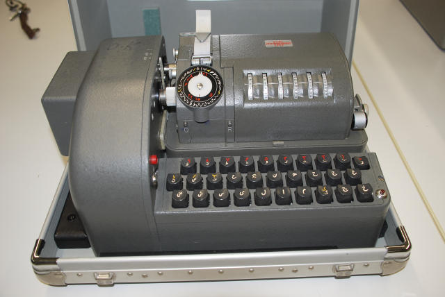 Hagelin C-52 codeermachine met B-52 toetsenbord (Arabische versie).